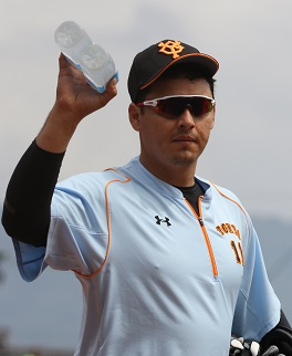 ジャイアンツクルーズ選手